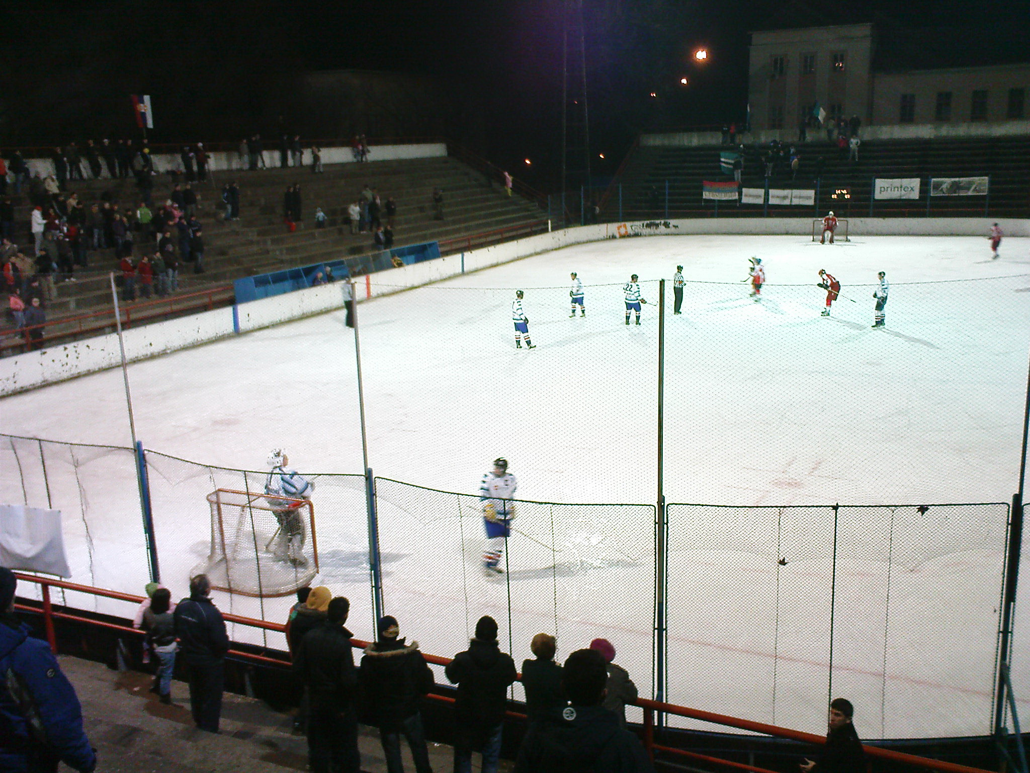 Hockey Game Spartak-Vojvodina